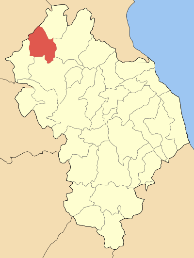 Locator map of Sarantaporou municipality (Δήμος Σαρανταπόρου) at Larisa perfecture, Greece.